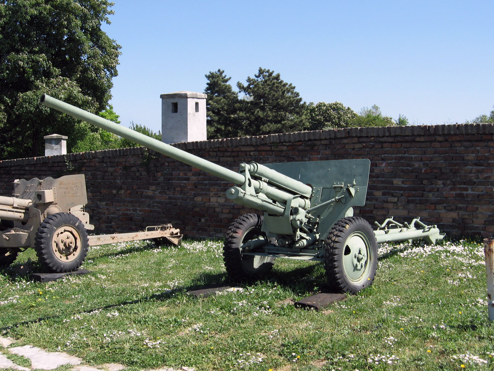 Russian anti-tank gun ZIS-2 57 mm (1943 year model)